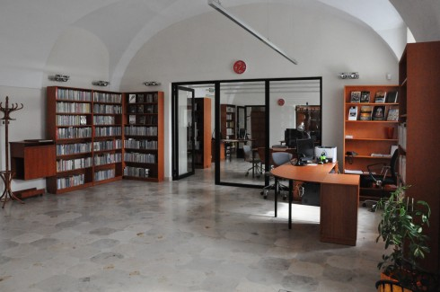 Filia nr 2 Miejskiej Biblioteki Publicznej w Lublinie